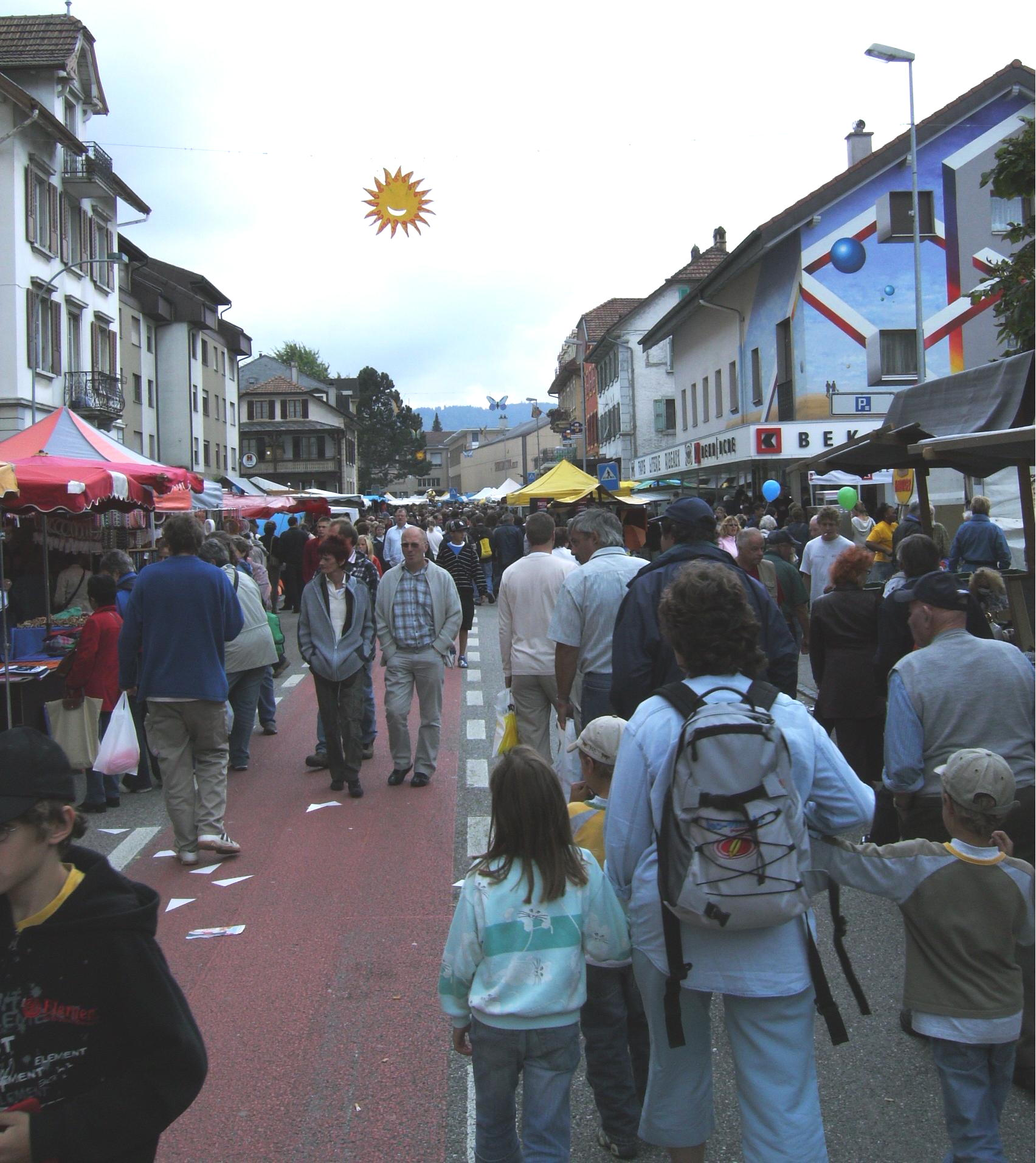 Grand-Rue (route cantonale) dans la zone des forains, Foire de Chaindon 2007 à Reconvilier (canton de Berne, Suisse).